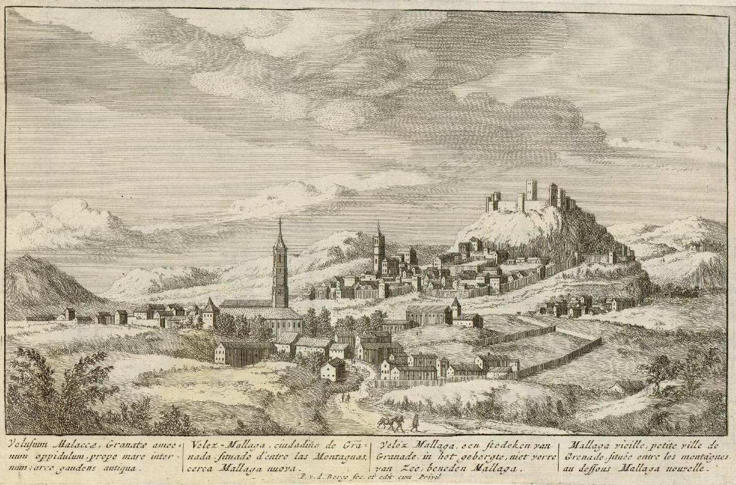 Vélez-Málaga. "ciudadiño de Granada". "Theatrum hispaniae exhibens regni urbes villas ac viridaria magis illustria". Colección de grabados al aguafuerte y buril de España y Portugal. Biblioteca Nacional de España